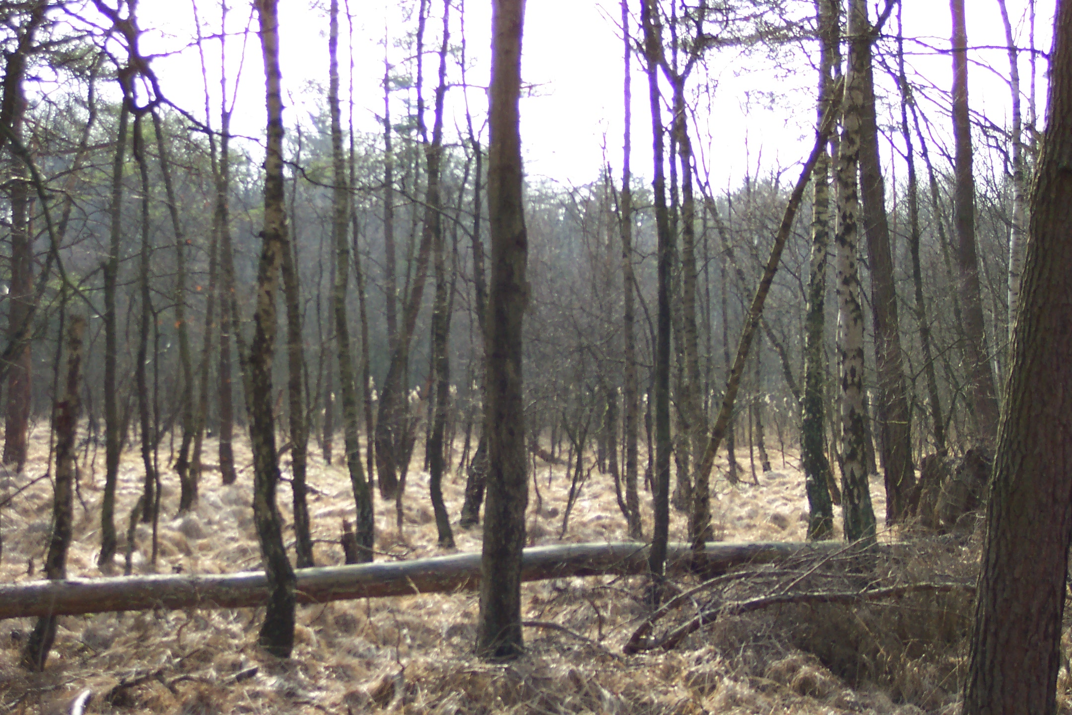 Hildener Heide, Hilden